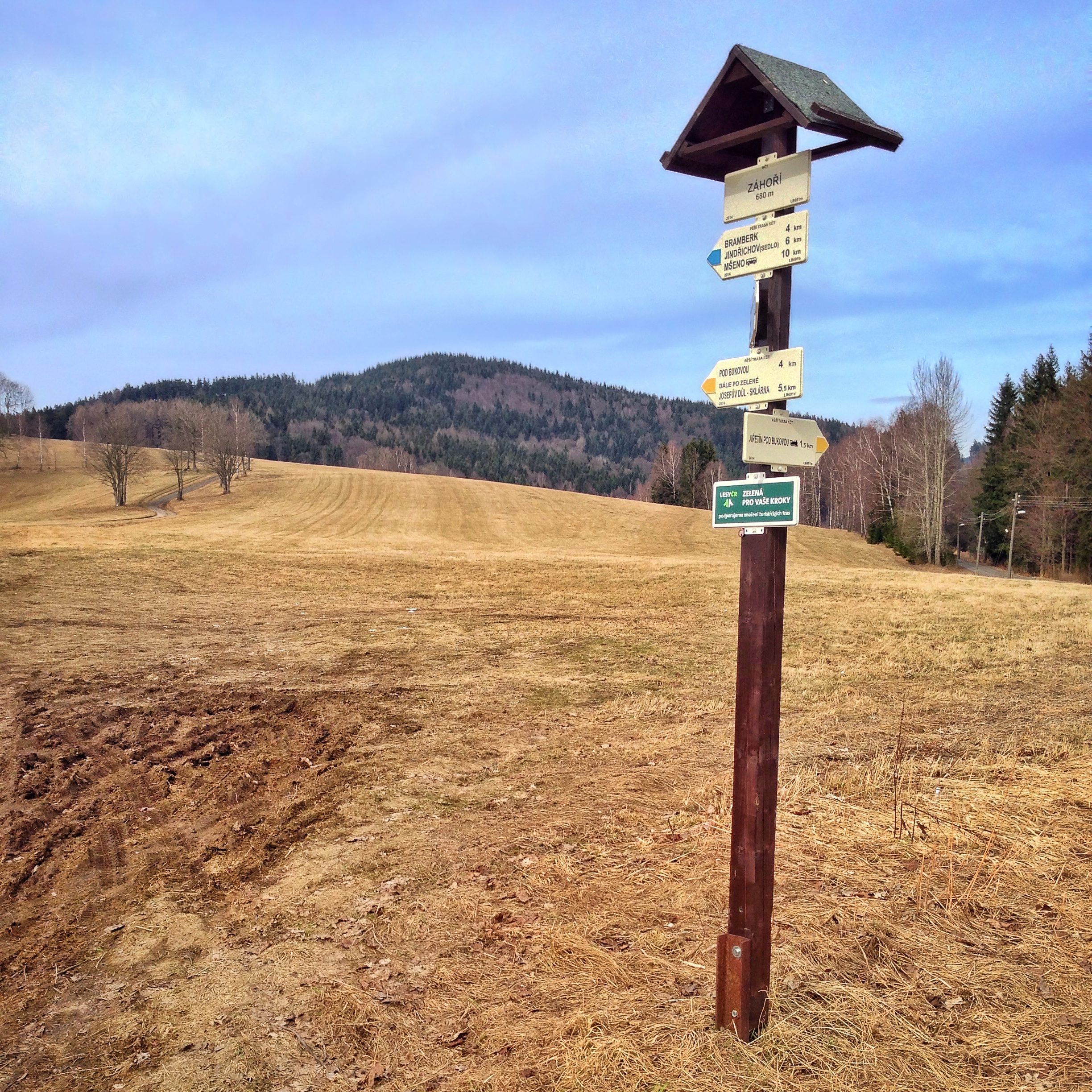 Buková (836 m) v Jizerských horách od jihu